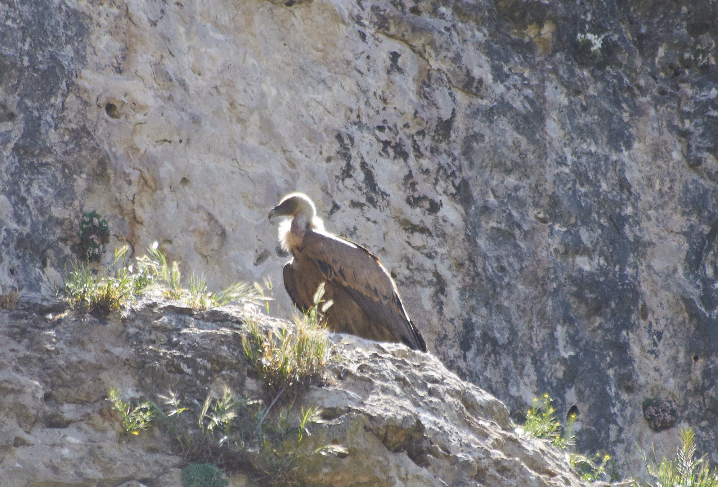 Buitre en el entorno del río Salado, en las cercanías de Santamera.